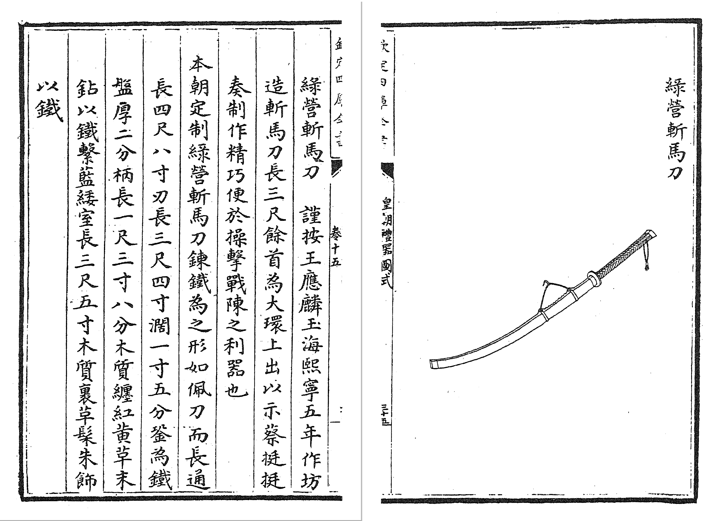 《皇朝禮器圖式》卷十五 綠營斬馬刀